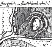 Burgstall Nößlbach Planskizze von Ludwig Benesch (1911)